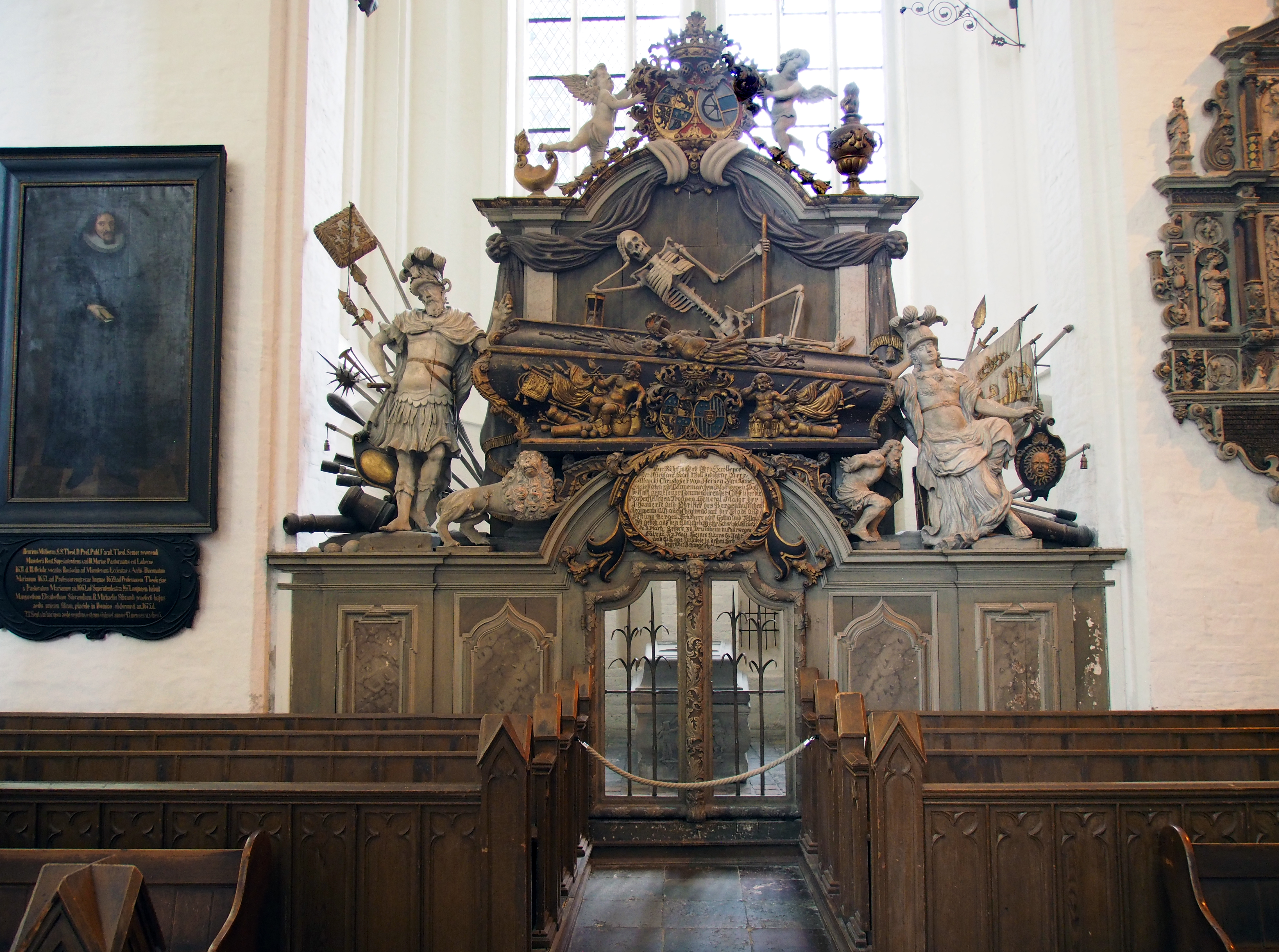 Grabkapelle General Albrecht Christoffer von Heinen, Ehefrau Margareta, Tochter Friederike Maria und Sohn Christian Ludwig von Heinen in der St. Marien Kirche (Rostock)